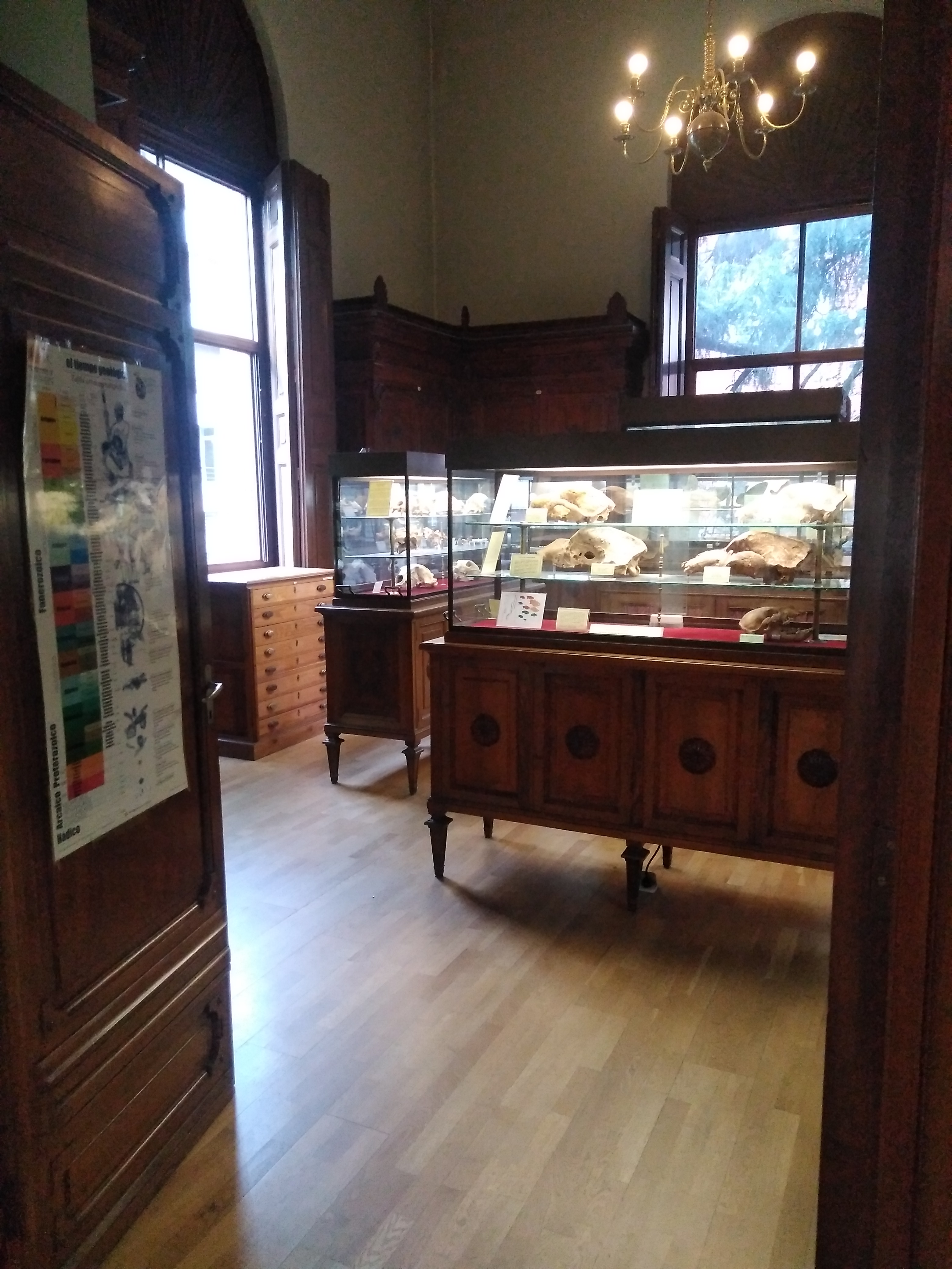 museo Histórico Minero «Don Felipe de Borbón y Grecia» de la Escuela Técnica Superior de Ingenieros de Minas y Energía de la Universidad Politécnica de Madrid